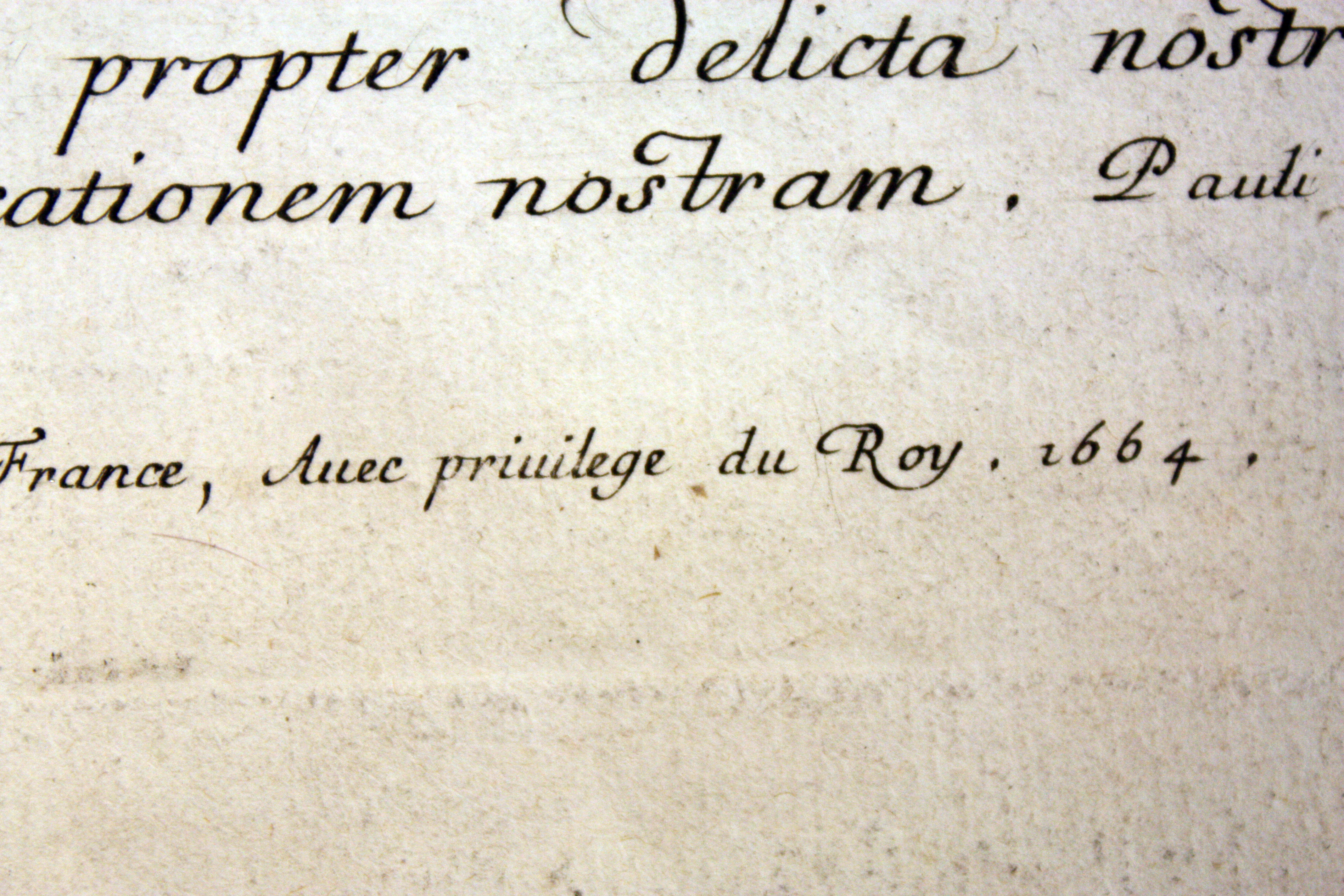 Détail d'une planche du Théâtre de la Passion de Grégoire Huret montrant le privilège royal.